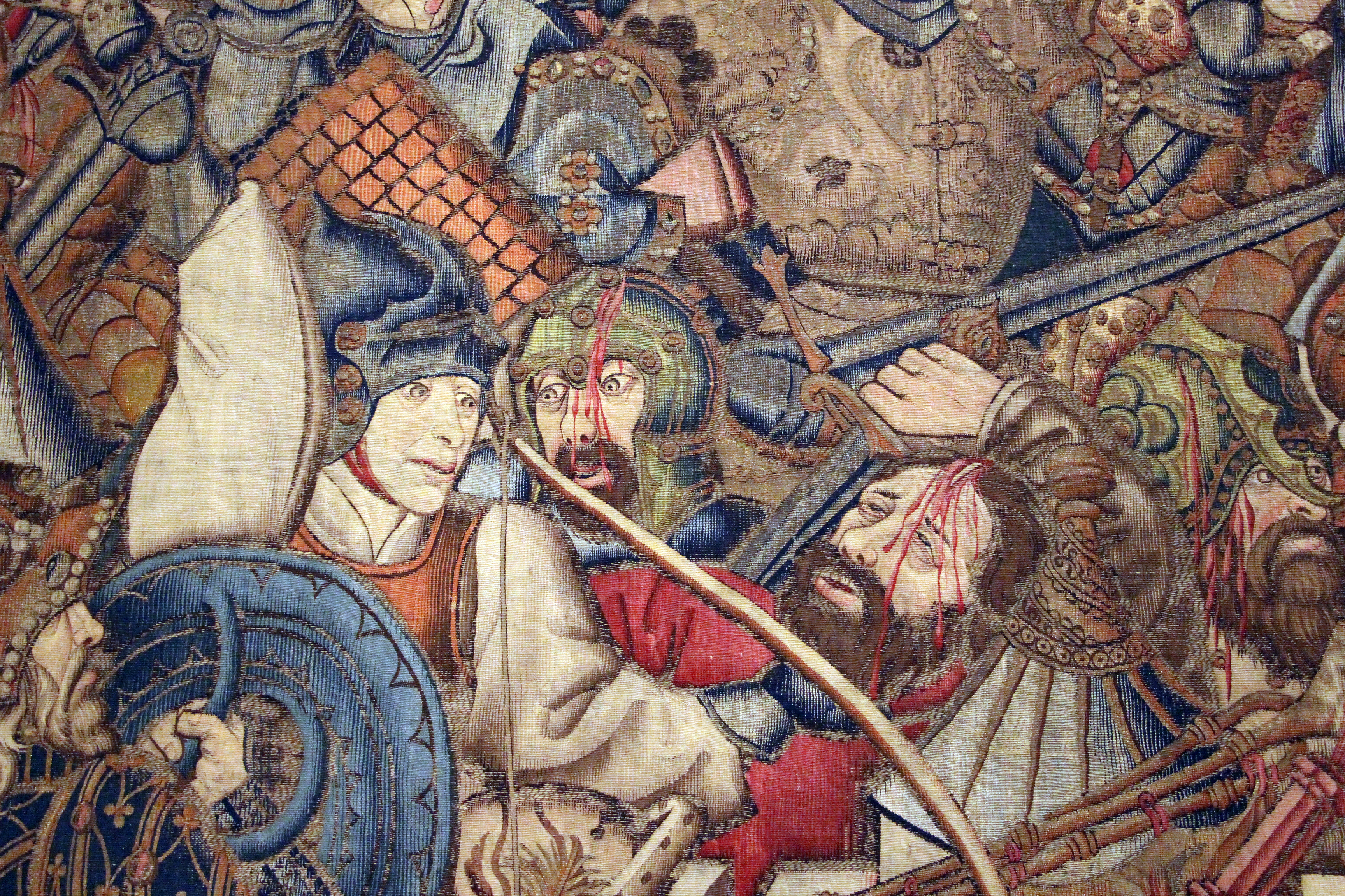 Tournai, arazzo con maturità di alessandro magno, 1460 ca, probab. fatti fare da pasquier grenet per filippo il buono, 10.JPG